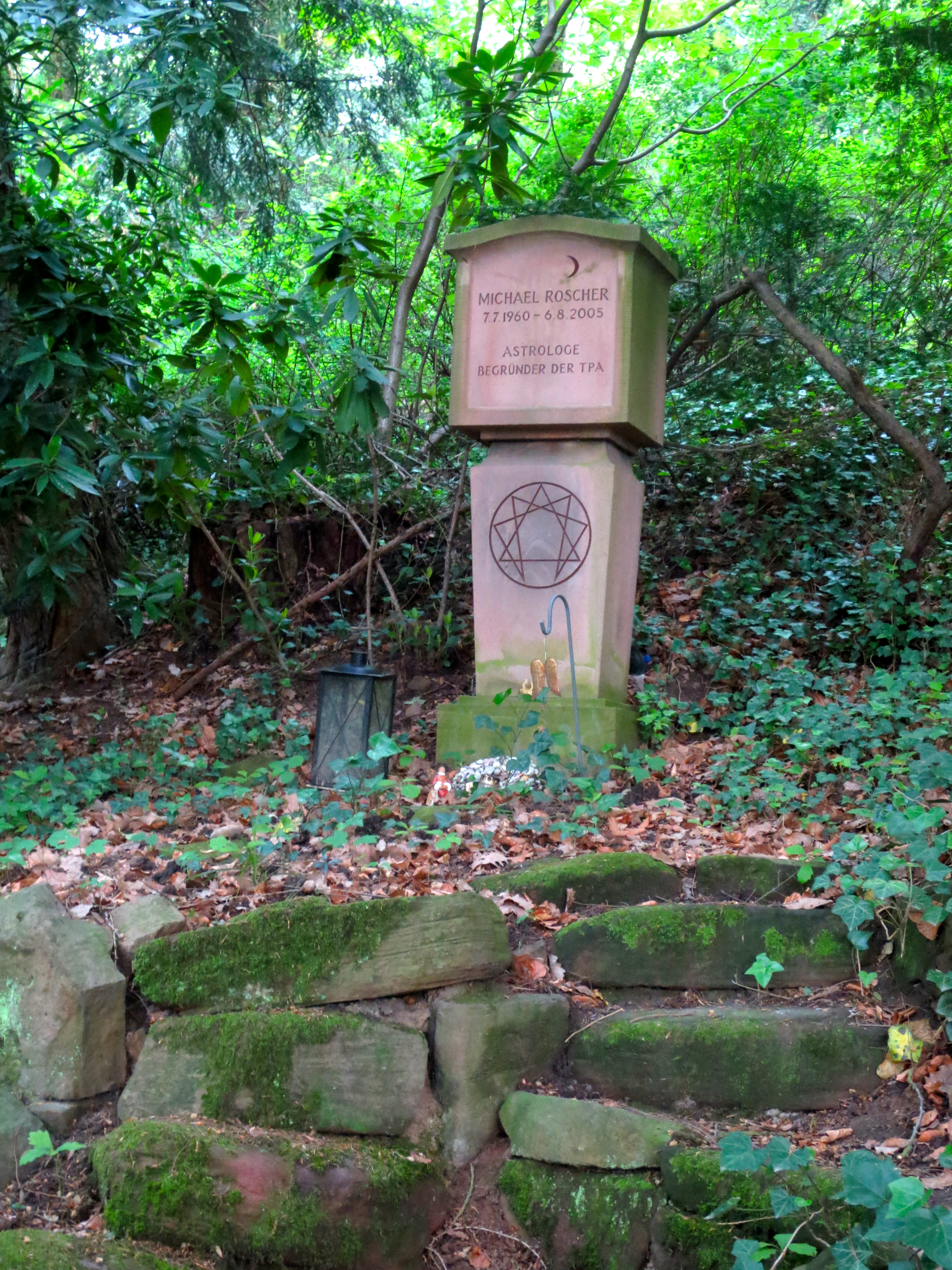 Grabmal Michael Roscher, Astrologe, Bergfriedhof (Heidelberg), Waldabteilung